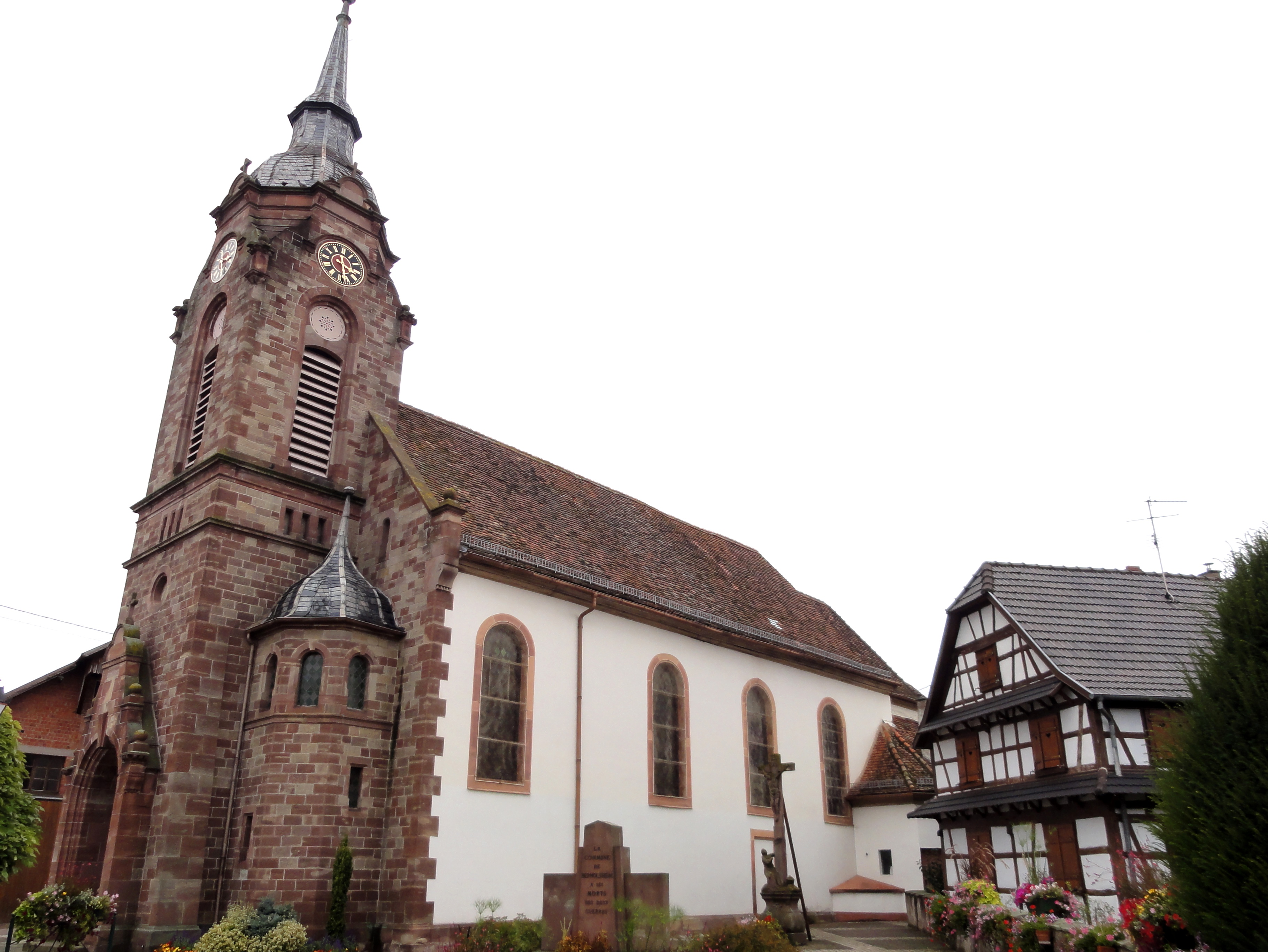 Alsace, Bas-Rhin, Église Saints Pancrace-et-Sébastien de Bernolsheim (IA00119107).